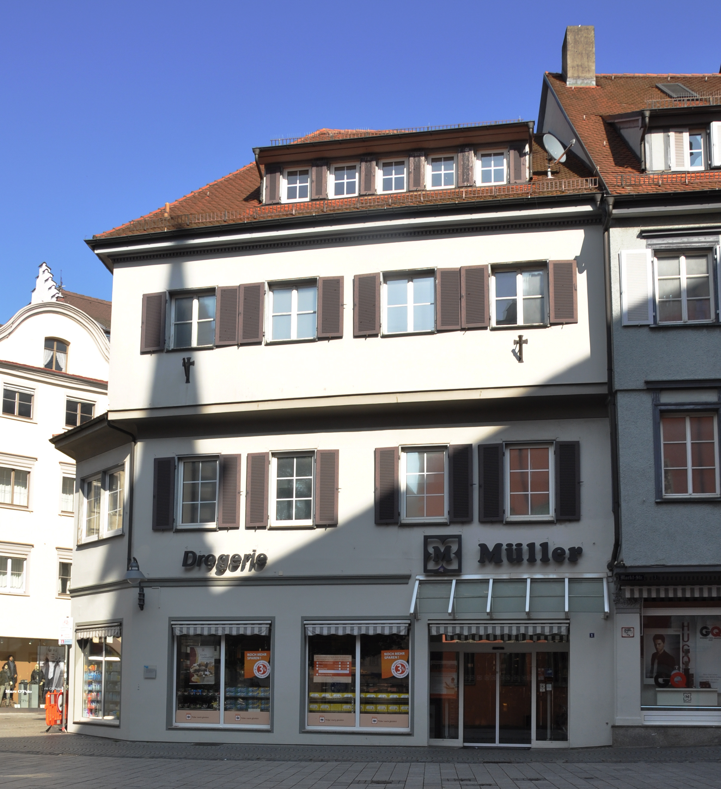 Ravensburg, Marienplatz 1